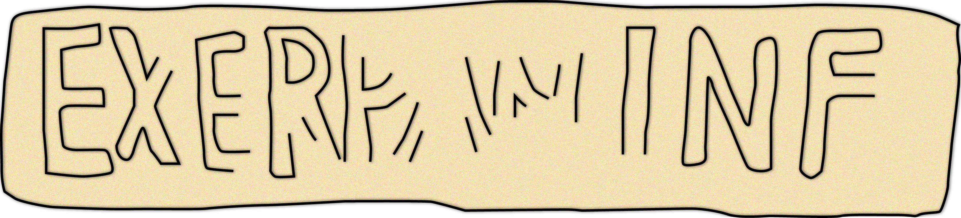 Sotin (Cornacum), Kroatien: Ziegelstempel EXER(citus) PAN(noniae) INF(erioris). Das Stück wird im Archäologischen Museum in Zagreb unter der Inventarnummer 17180 geführt. Nachweis: Mato Ilkić: Pečati na antičkim opekama i krovnim crepovima iz Sotina (Cornacum). In: Prilozi Inst. Arh. Zagrebu 38/2005 Zagreb 2005. S. 16–52; hier: S. 33.